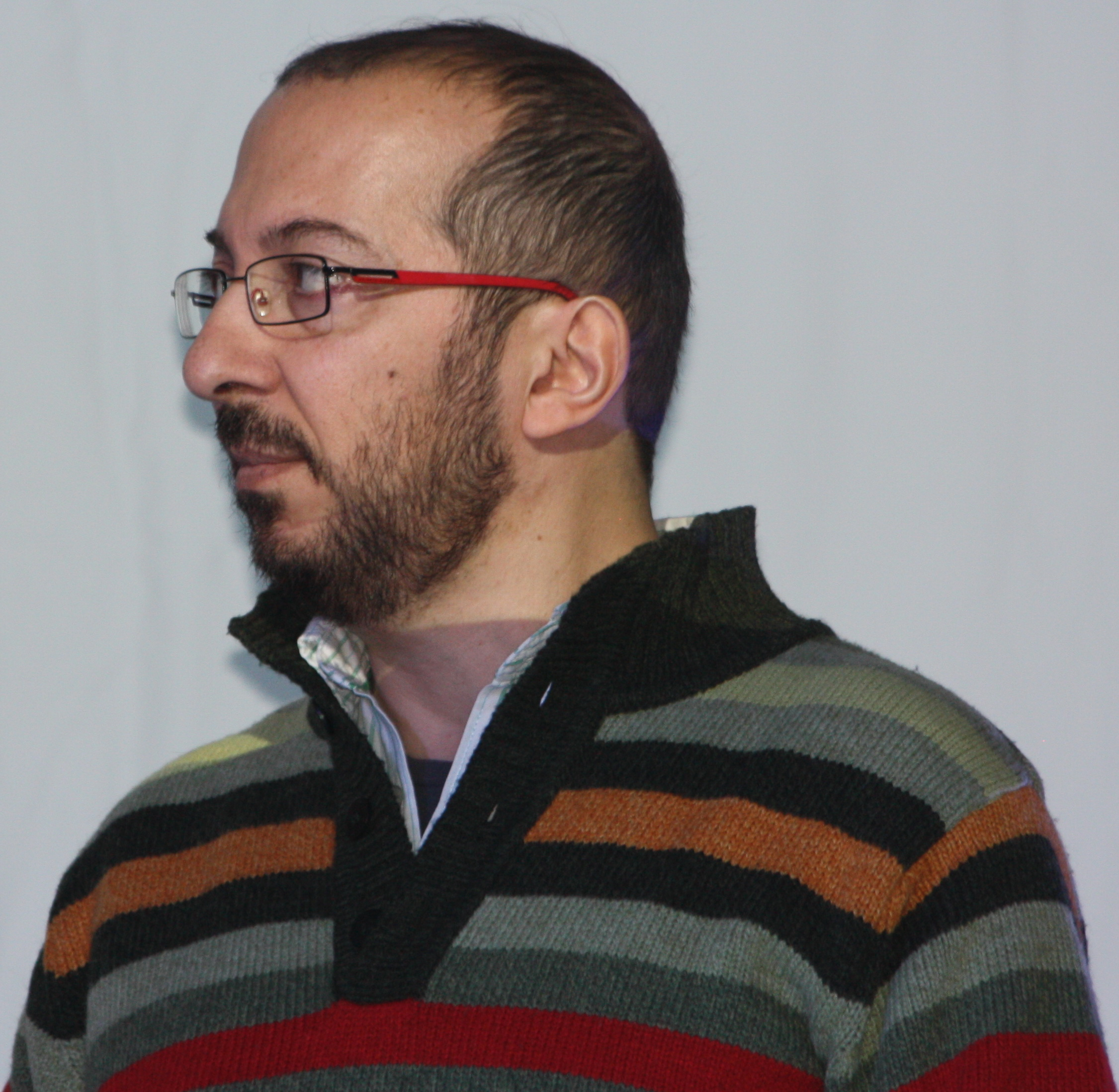 Fabrizio Mazzotta ospite a Play 2013